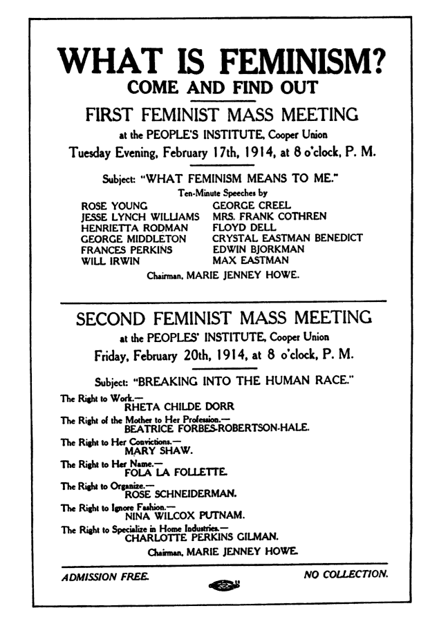 Handbill for feminist meeting.